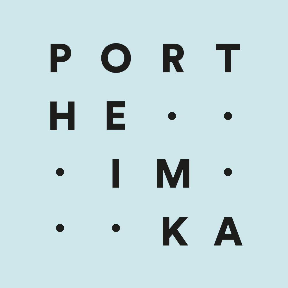 logo